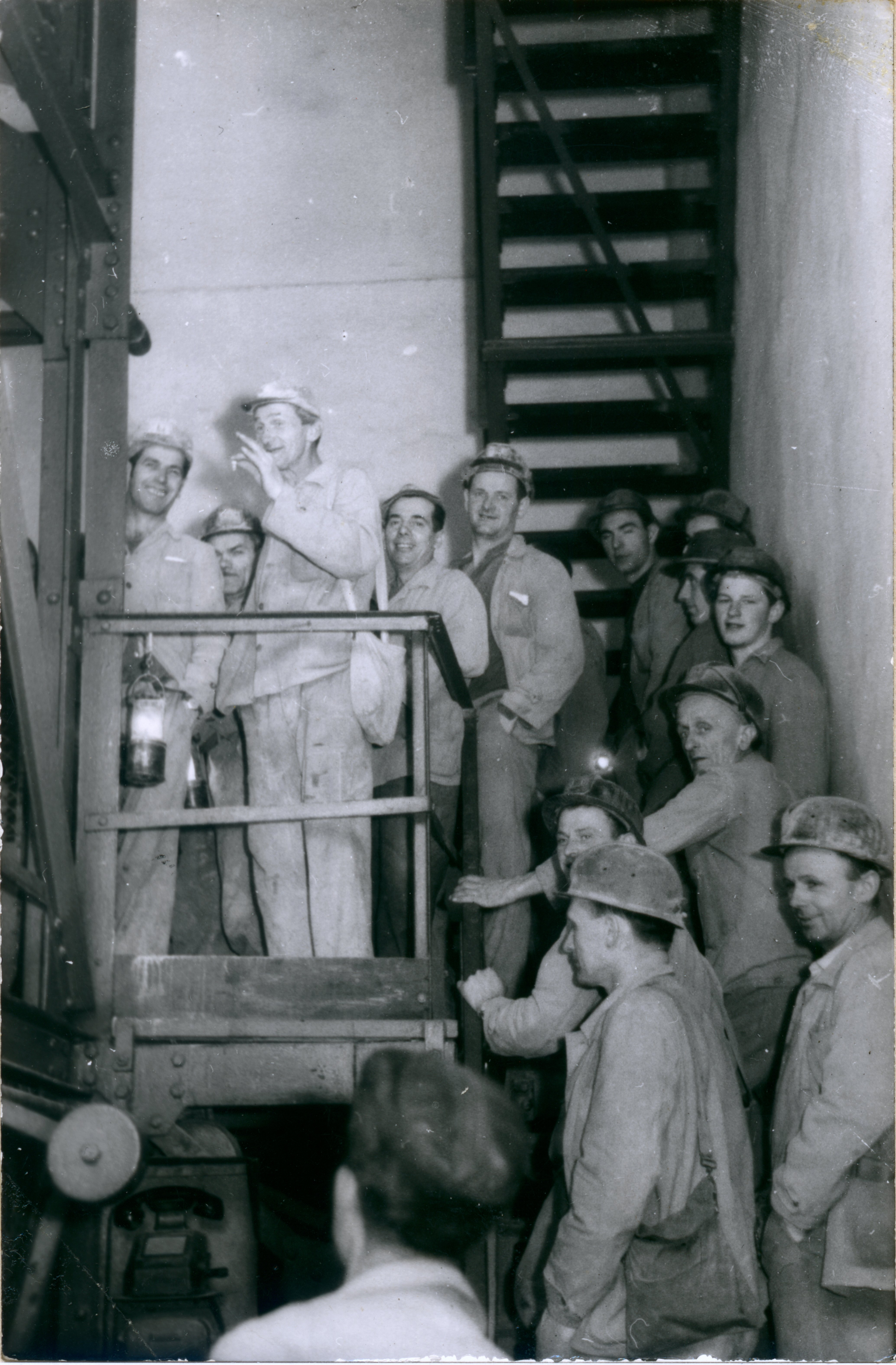 Rudarji pred spustom v jamo, Rudnik živega srebra Idrija - Frančiškov jašek. Objavljeno v Idrijskih razgledih 1963/1.